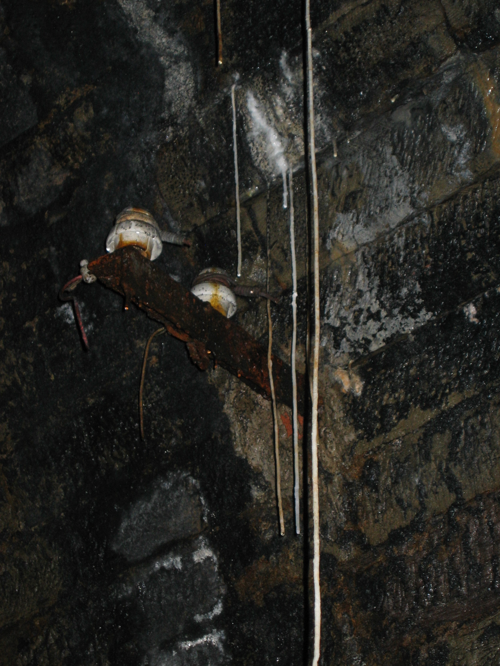 Der Rosensteintunnel beherbergt zahlreiche Stalaktiten.